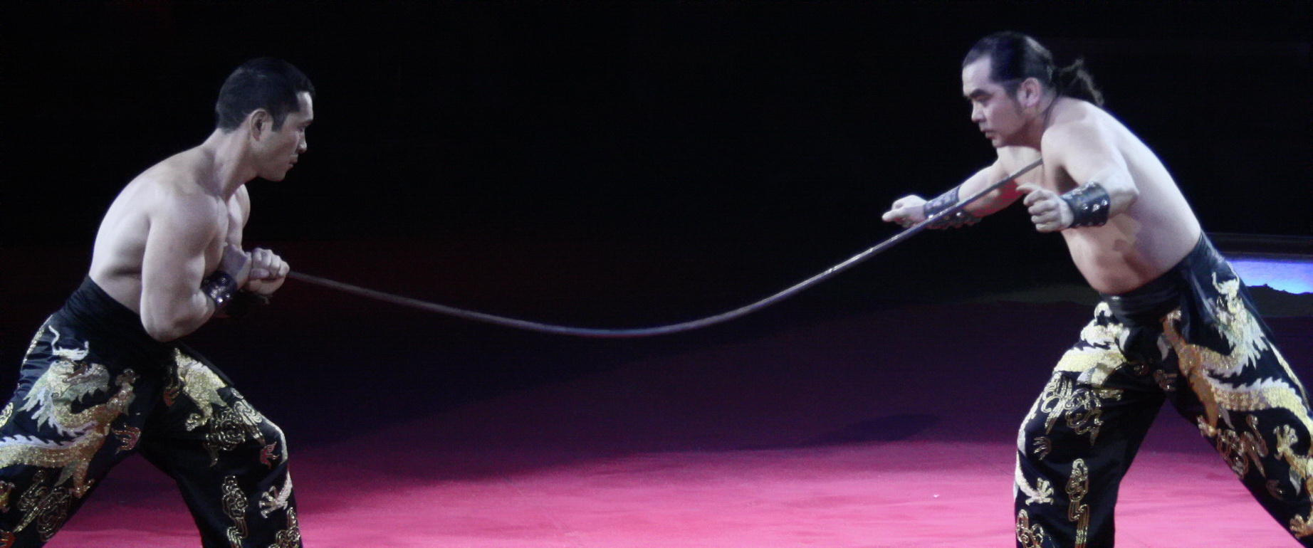 Shaolin Kung Fu-Truppe zeigt in Originalkostümen der legendären Shaolin-Mönche atemberaubende asiatische Kampfkünste. Hier wird eine Eisenstange durch Druck auf den Hals verbogen, ohne dass dies zu einer Verletzung führt.